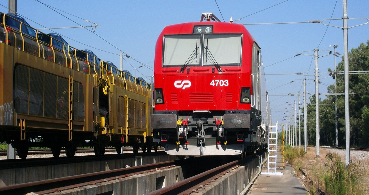 Locomotiva eléctrica Siemens em ensaios